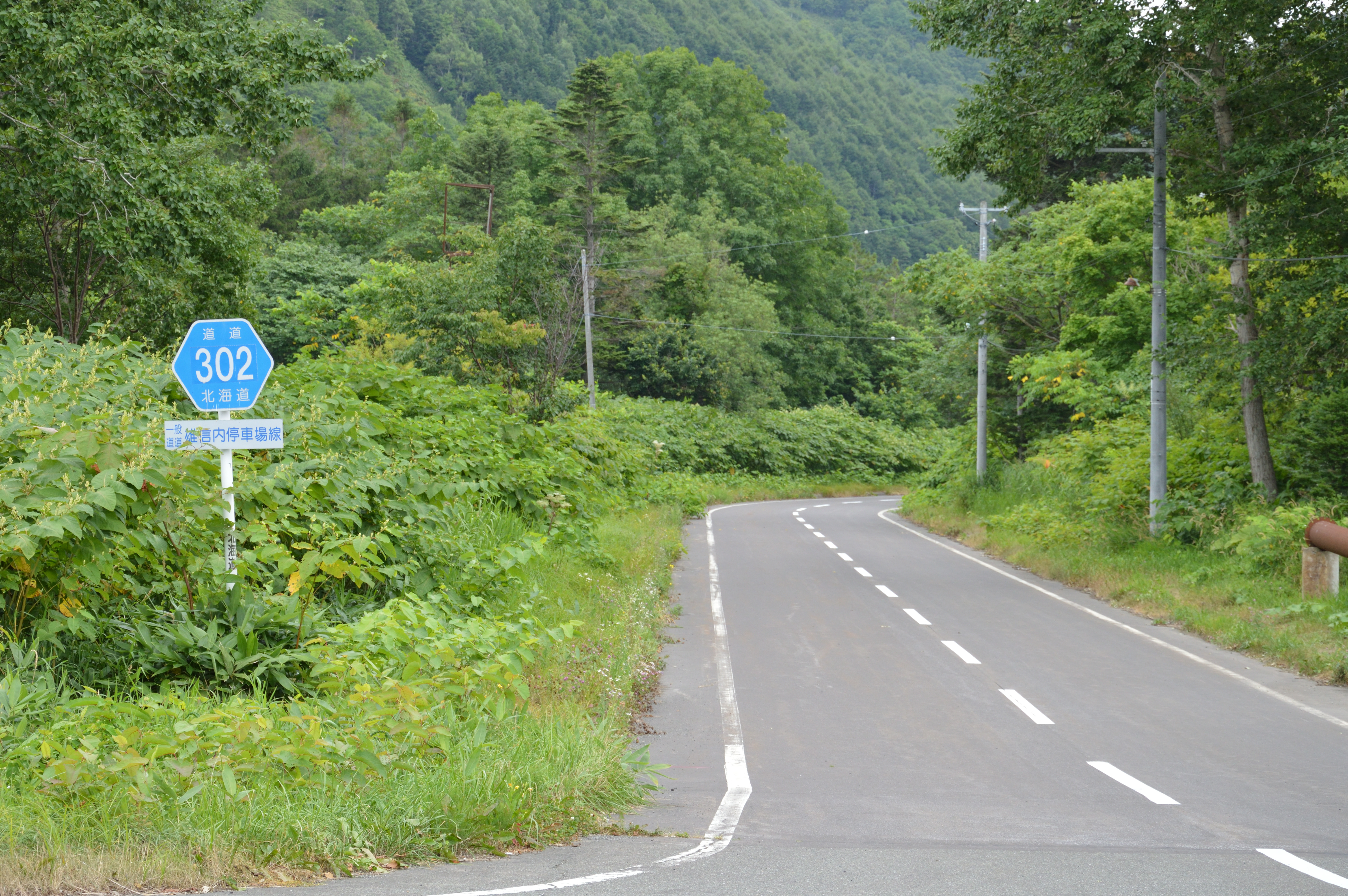 北海道道302号雄信内停車場線（幌延町雄興の道道256号合流点付近）